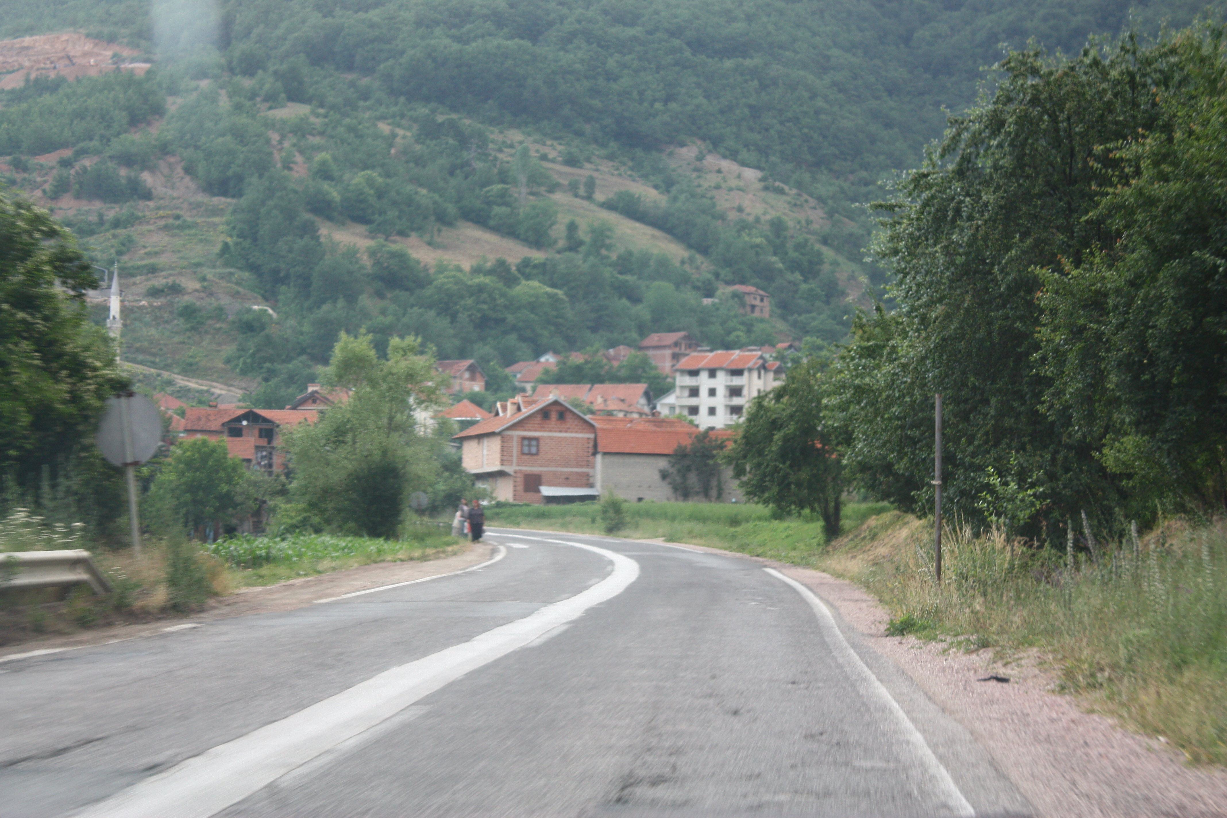 Kolari, Macedonia